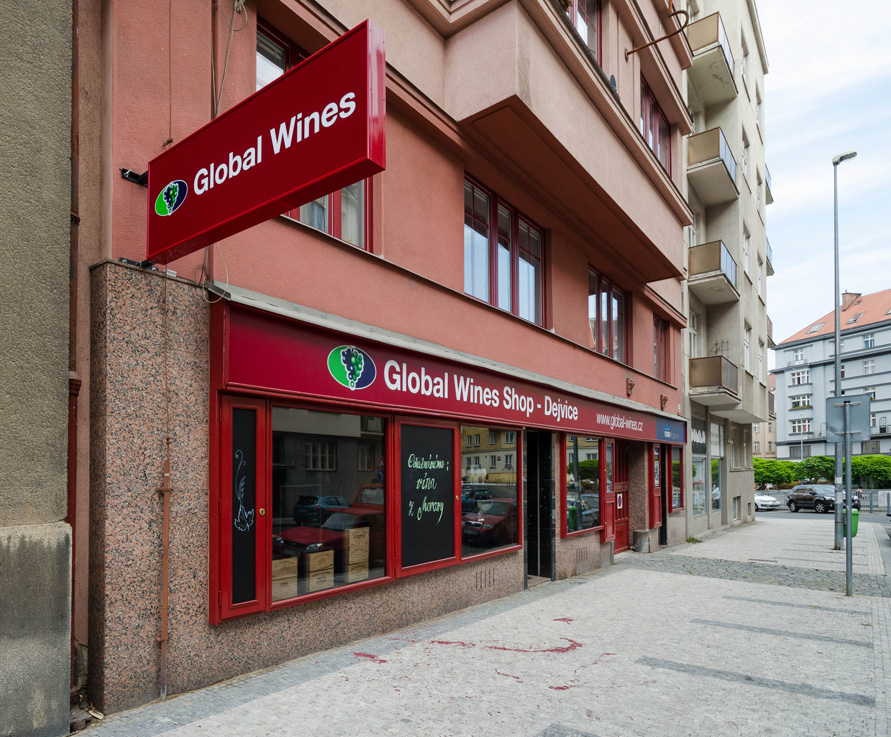 Čelní fotografie prodejny Global Wines v Dejvicích, Wuchterlova 583/18.